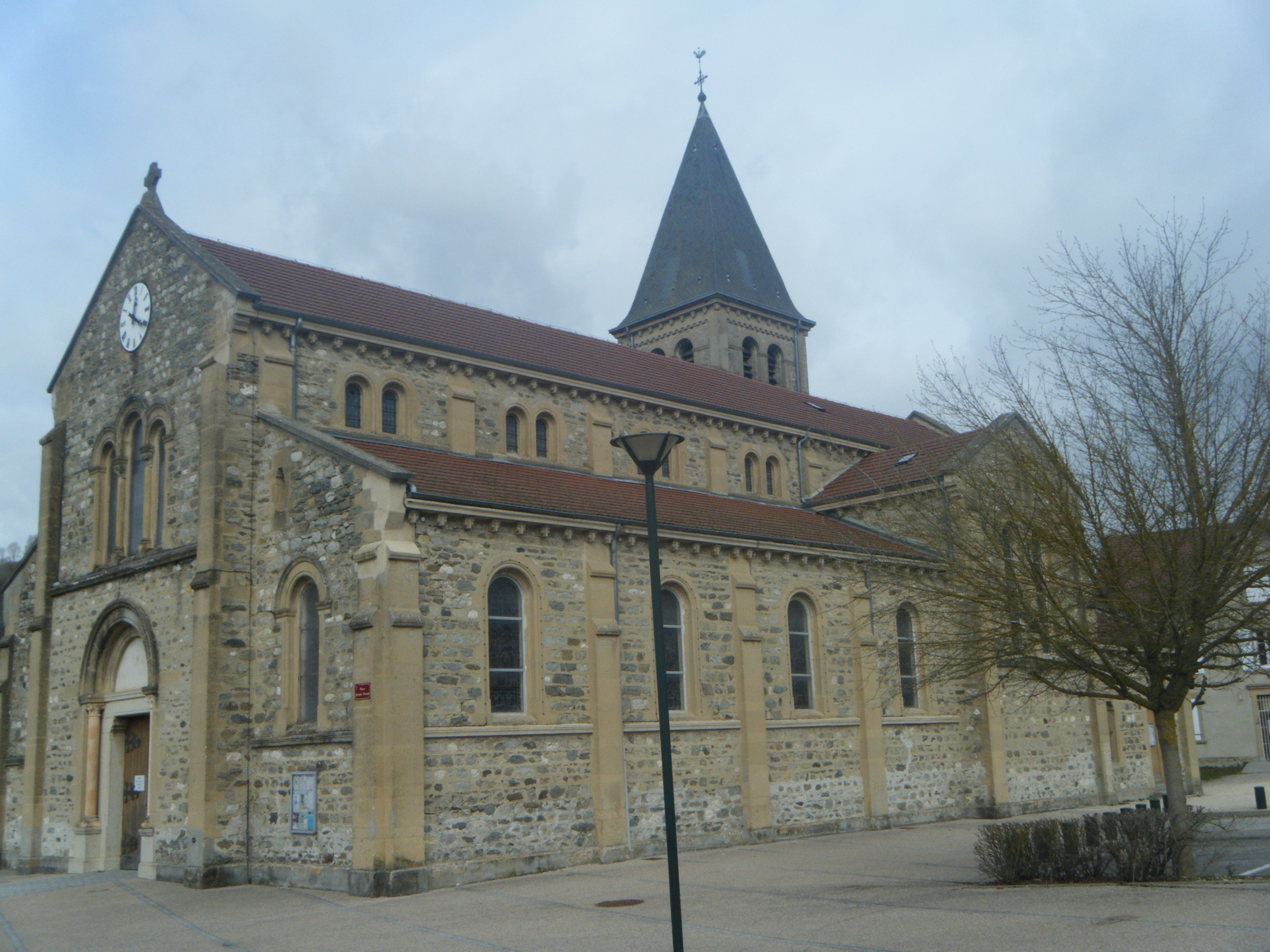 Église de Chirens en mars 2015